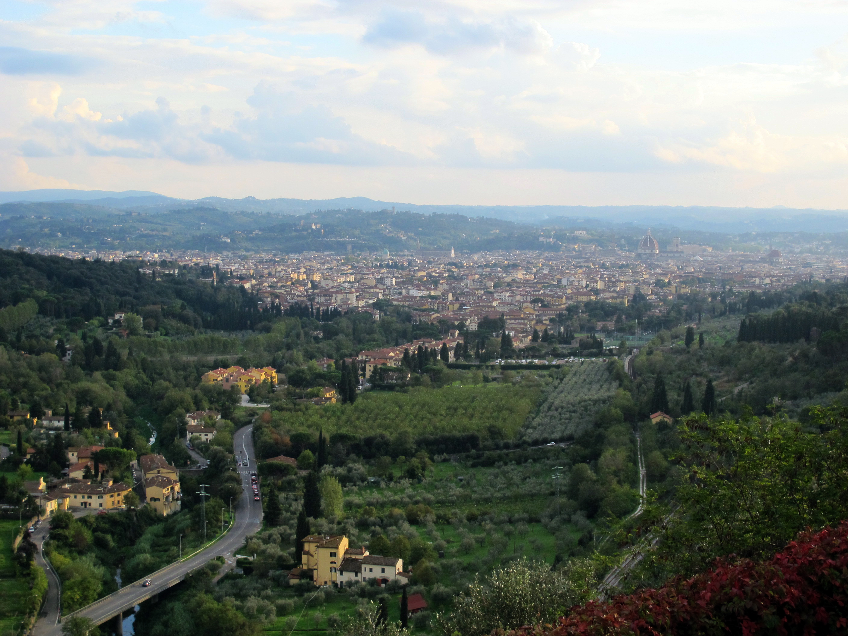 Monterinaldi, vista su firenze